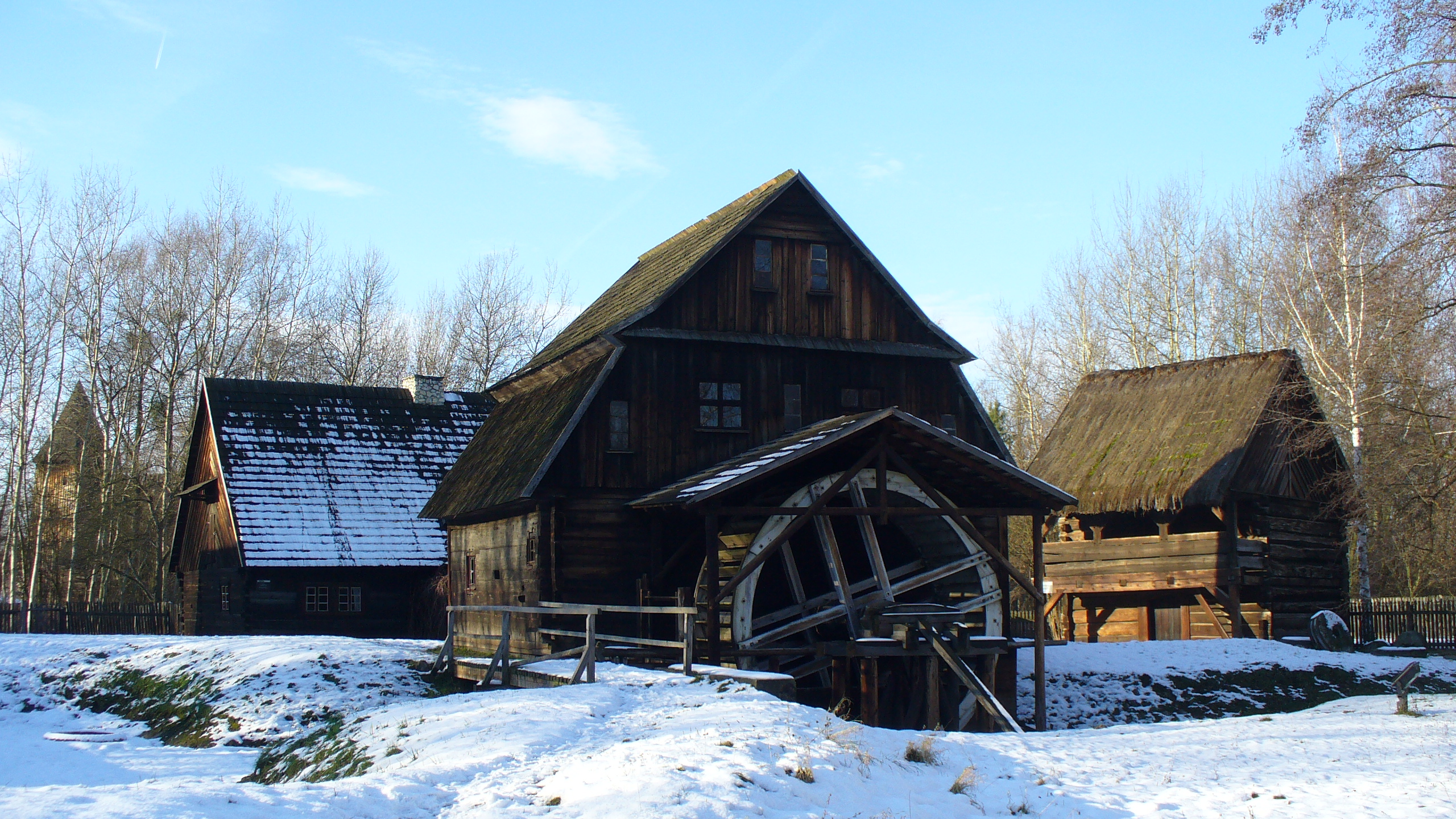 Muzeum Wsi Opolskiej. Młyn wodny ze Starych Siołkowic, koniec XVIII w., przebudowany w 1832 Wassermuehle aus Alt Schalkowitz, Ende des XVIII Jh, 1832 umgebaut The water-mill from Siołkowice Stare (Alt Schalkowitz), from the end of XVIII th cent., rebuilt in 1832